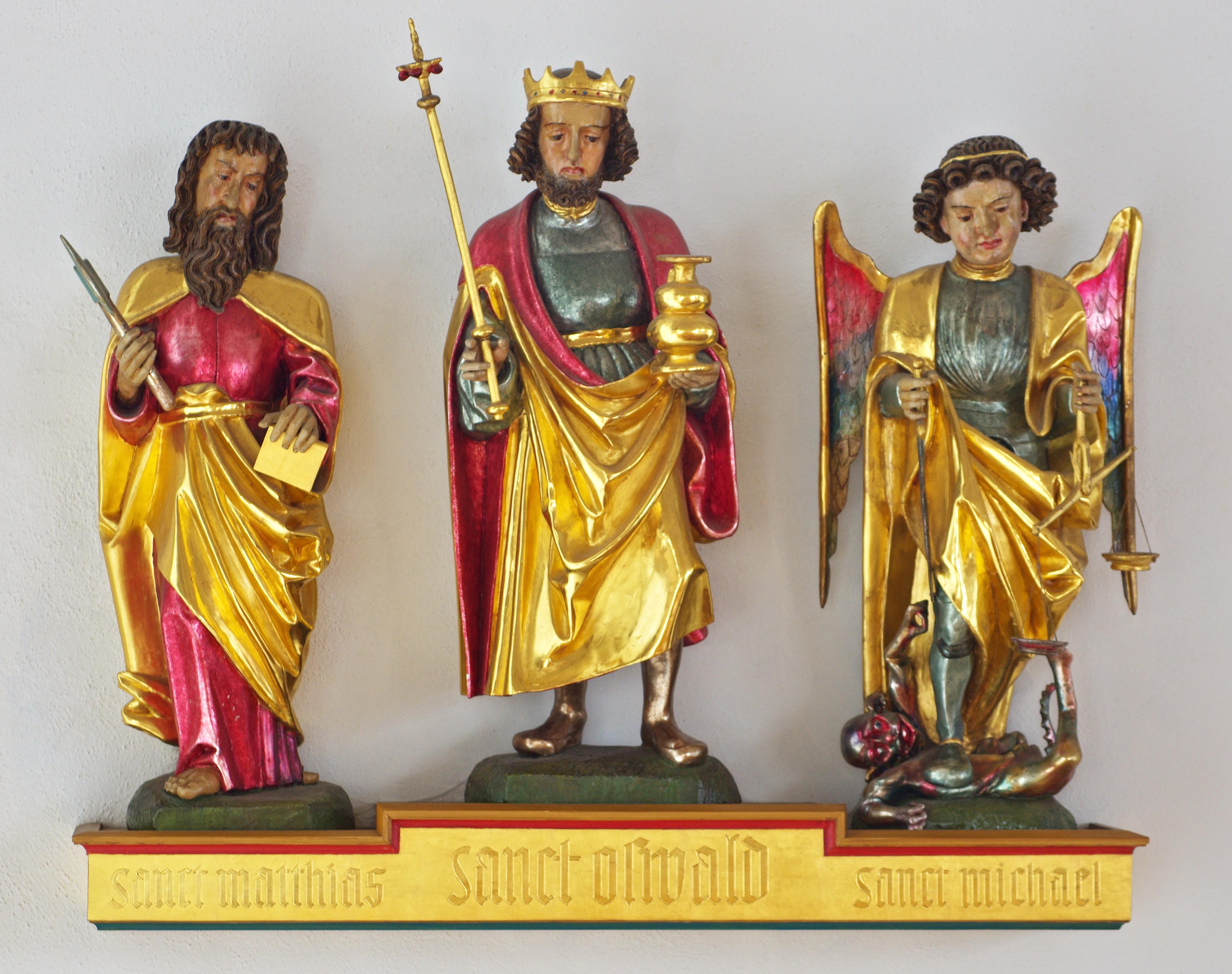 Blick auf die Pfarrkirche Maria in der Zarten in Hinterzarten Die signierte Schnitzwerk von Hans Wydyz